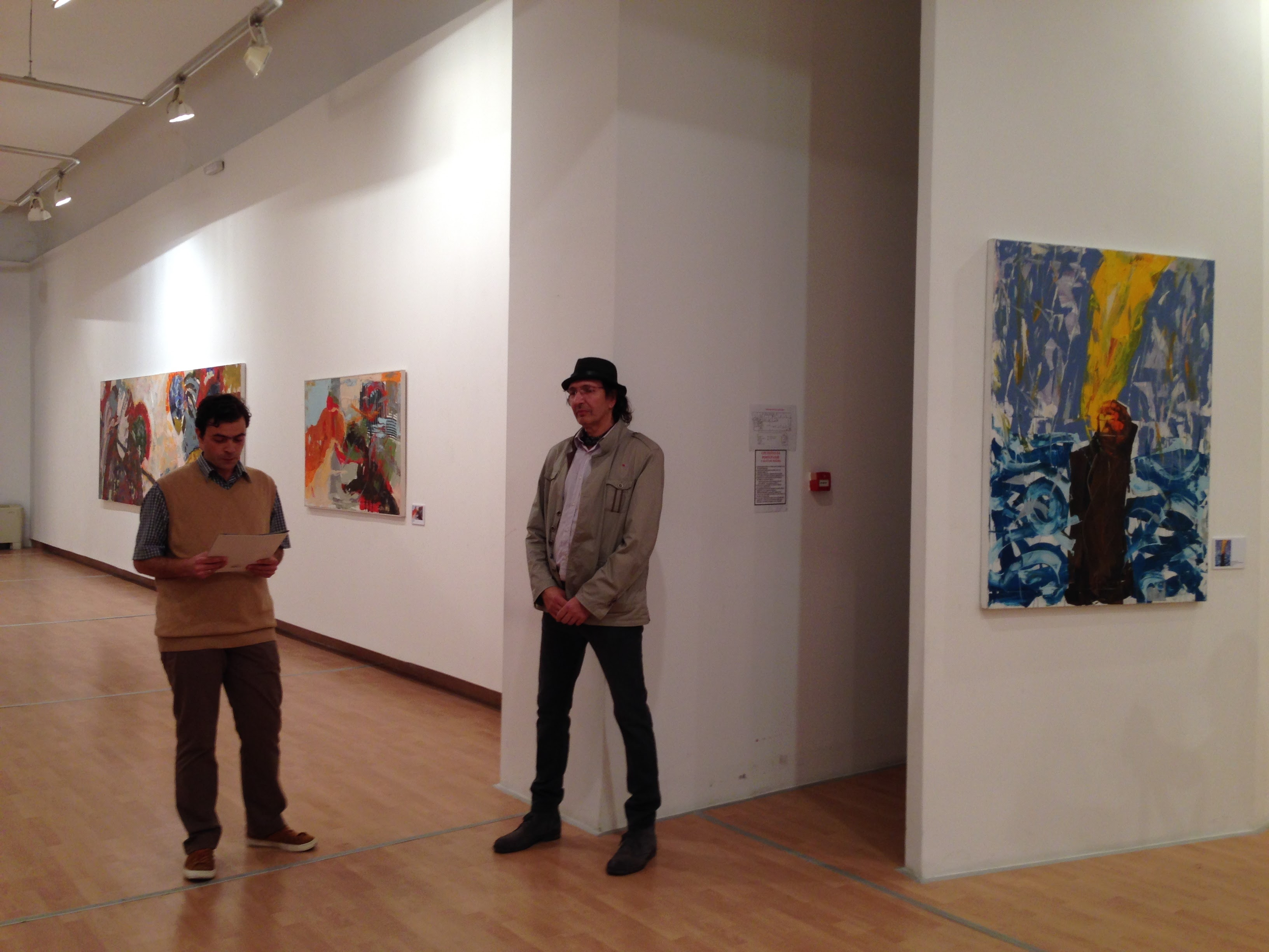 Srpski (latinica): Nikola Žigon na otvaranju samostalne izložbe; "Slike" u Galeriji "Srbija" u Nišu, 23. avgusta 2016.